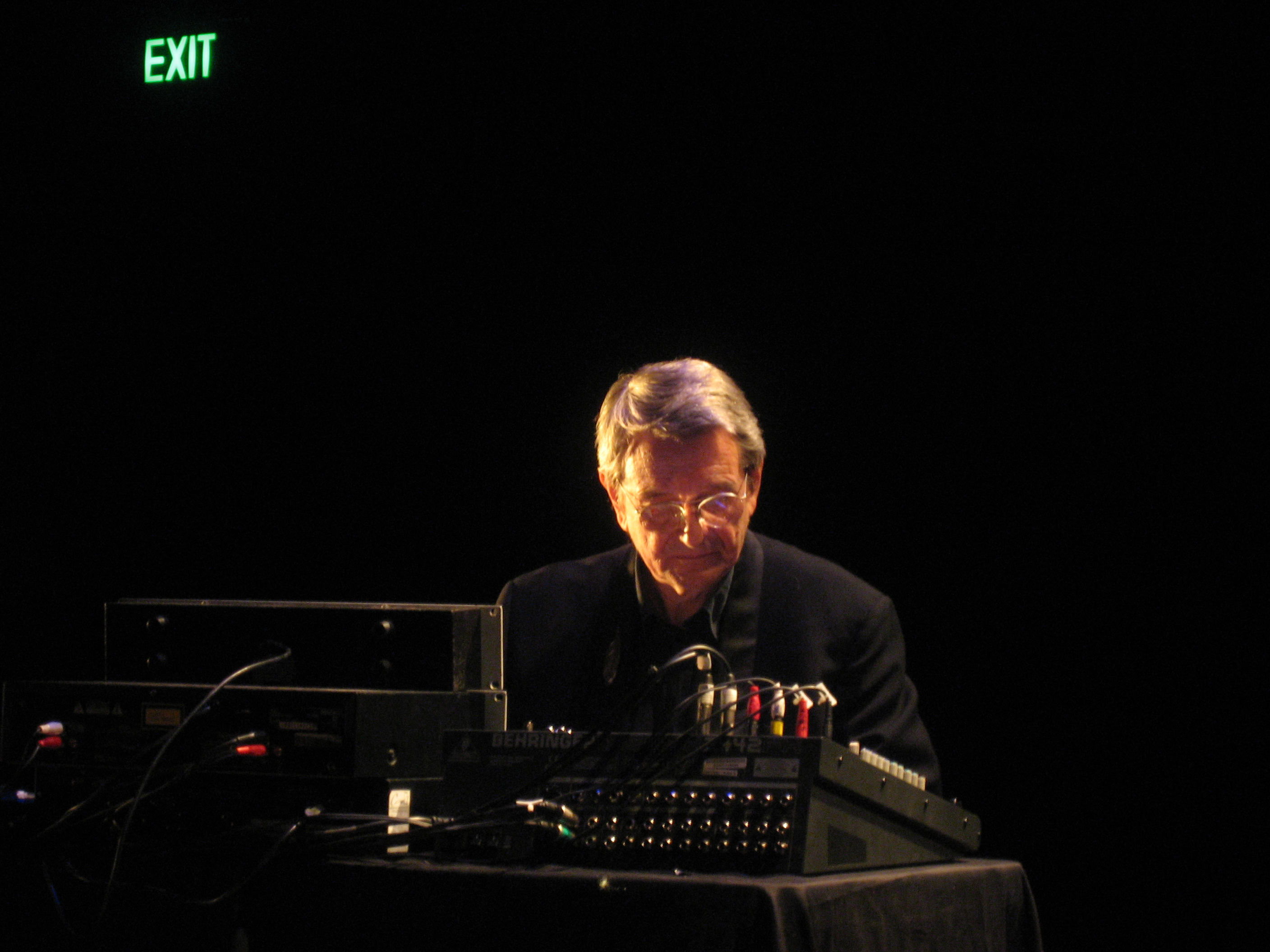 @ liquid architecture 10 in sydney